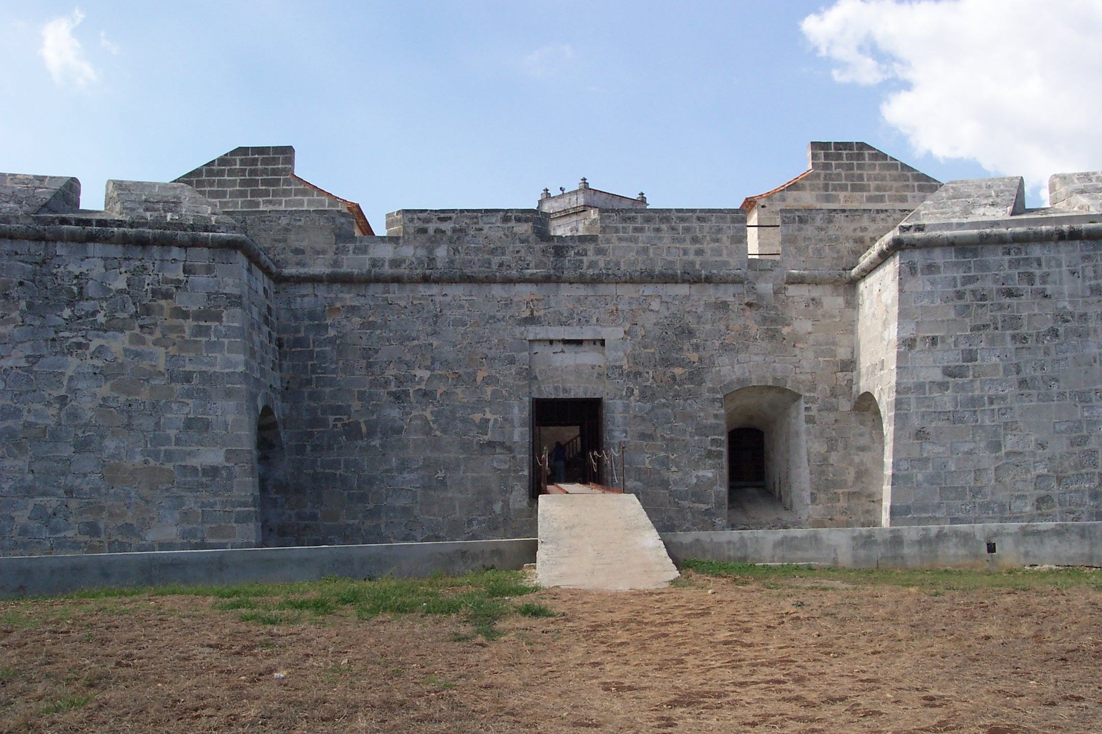 Entrance to Castillo de la Real Fuerza in Havana